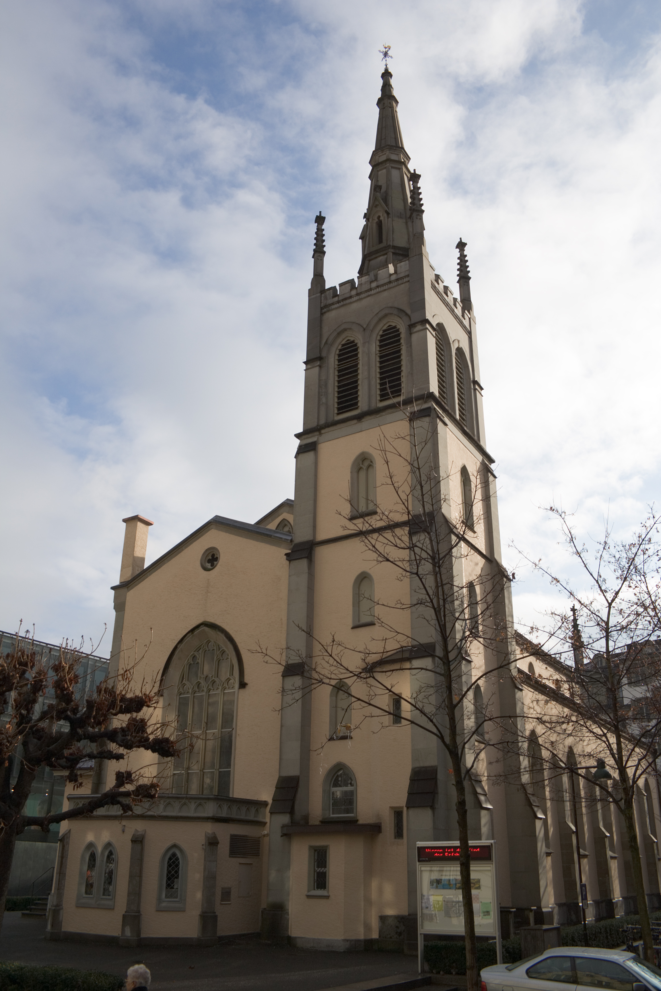 Matthäuskirche von Ferdinand Stadler in Luzern, Schweiz